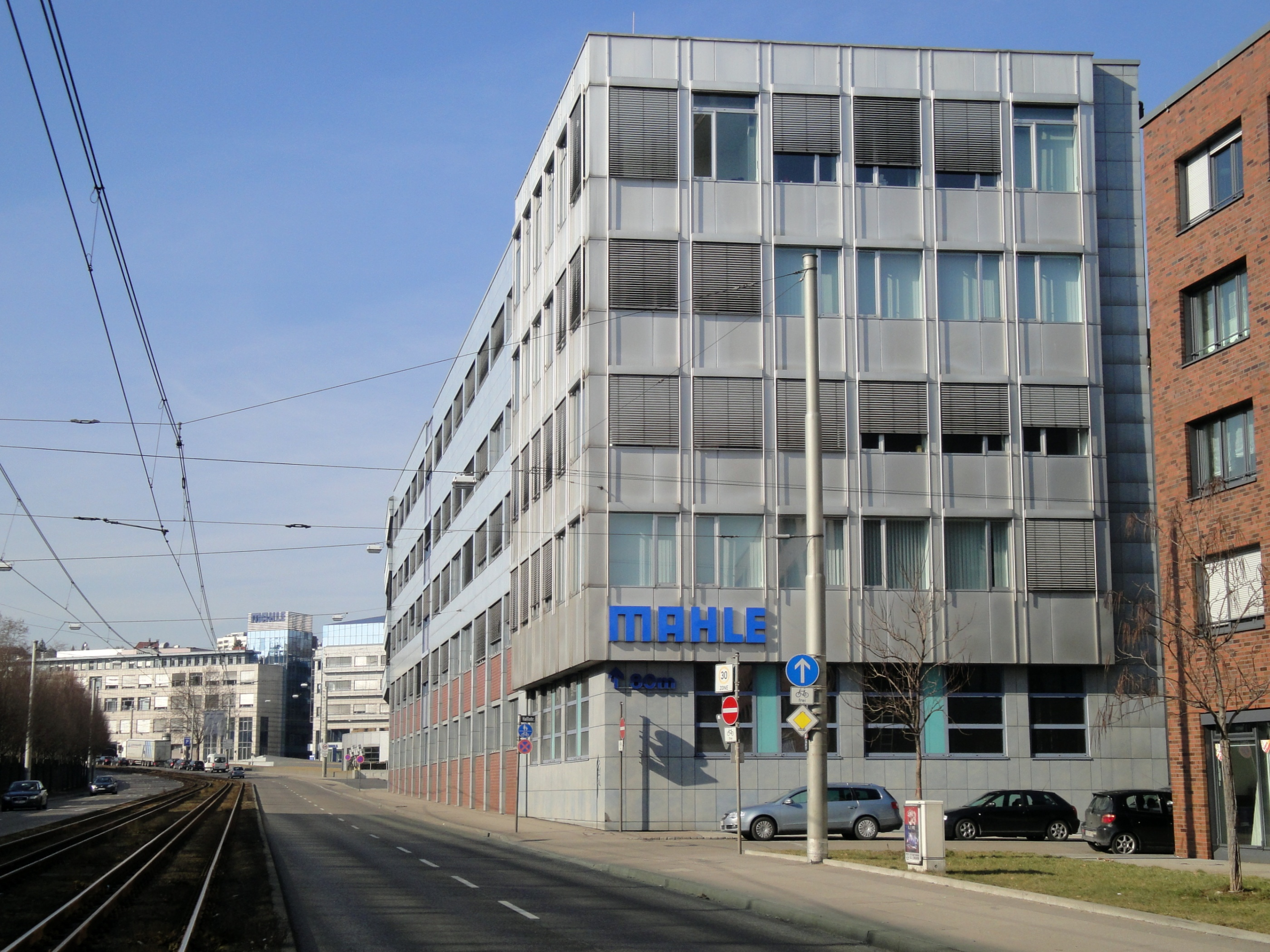 Mahle GmbH an der Pragstraße in Stuttgart-Bad Cannstatt